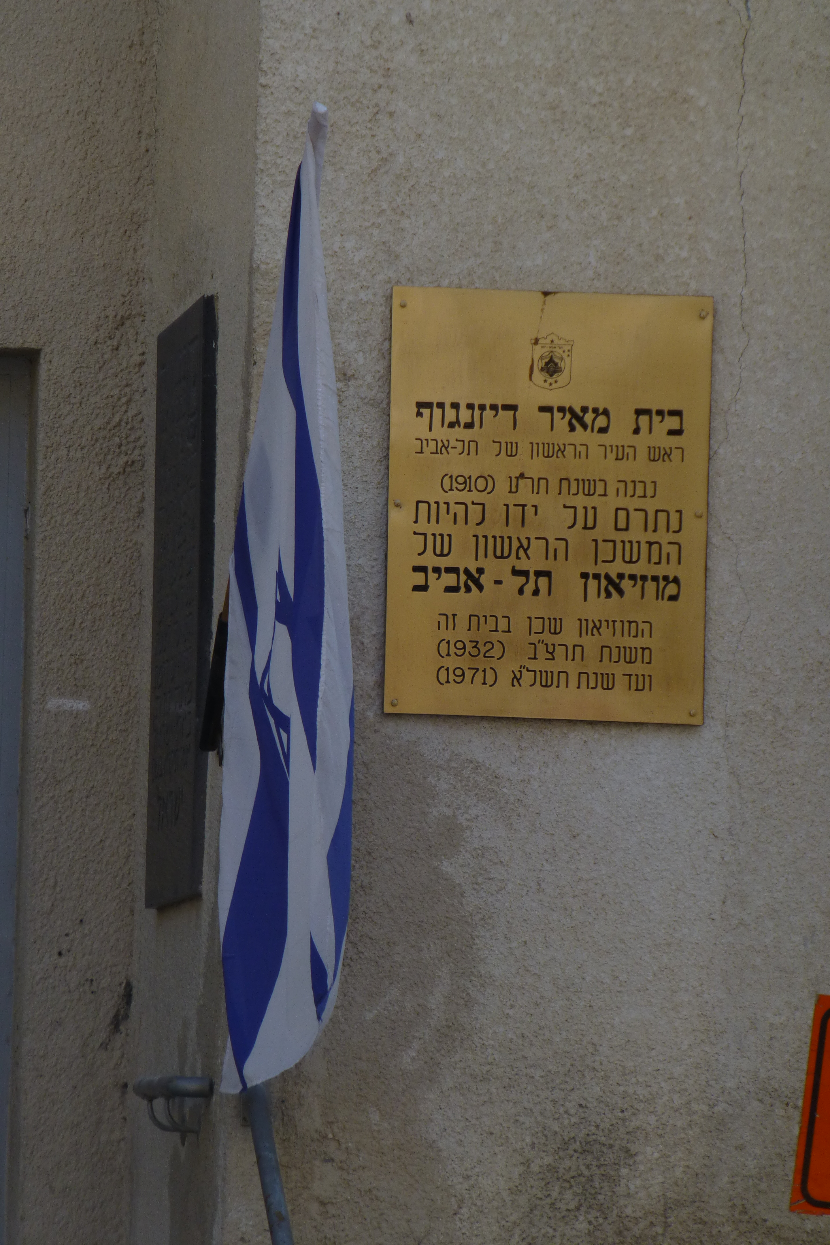 בית העצמאות הוא המקום בו נערך טקס הכרזת העצמאות של מדינת ישראל. בית העצמאות, ביתם של צינה ומאיר דיזינגוף, מבתיה הראשונים של תל אביב. הבית שנבנה בשנת 1910 על ידי מאיר דיזנגוף ונבחר לארח את טקס הכרזת המדינה בשנת 1948 וכיום הוא משמש מוזיאון היסטורי לתולדות ההכרזה ההיא, תחת השם בית העצמאות. המסע מתחיל עם הרצל, עובר דרך הקמת תל-אביב ופועלו של דיזנגוף, ומסתיים באולם הכרזת העצמאות, עם שחזור מלא של ההודעה המרגשת בקולו של בן גוריון.